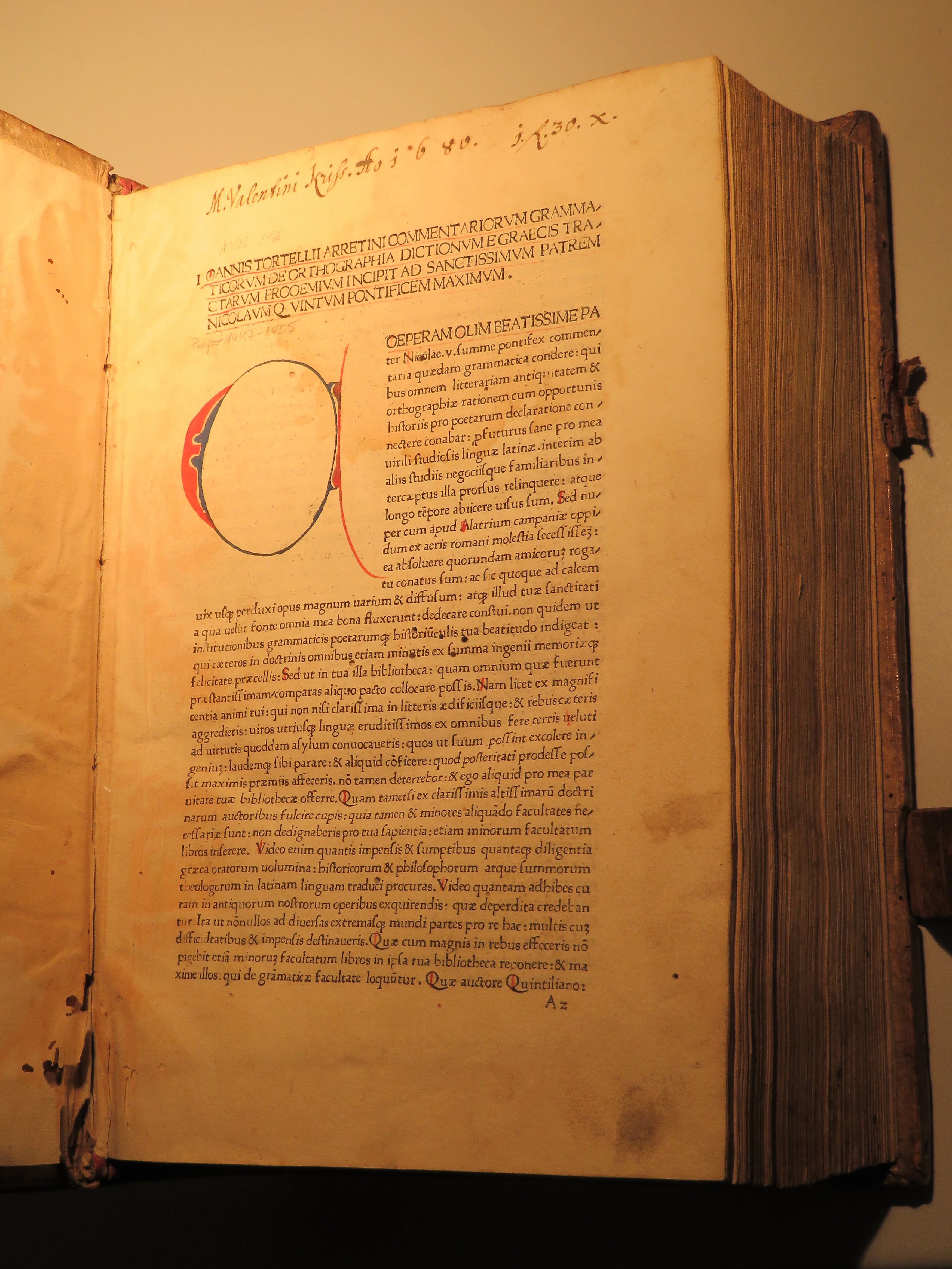 Textanfang der Inkunabel "De orthographia", im Jahr 1477 in Treviso gedruckt von Hermann Liechtenstein, Exemplar der Liechtensteinischen Landesbibliothek in Vaduz